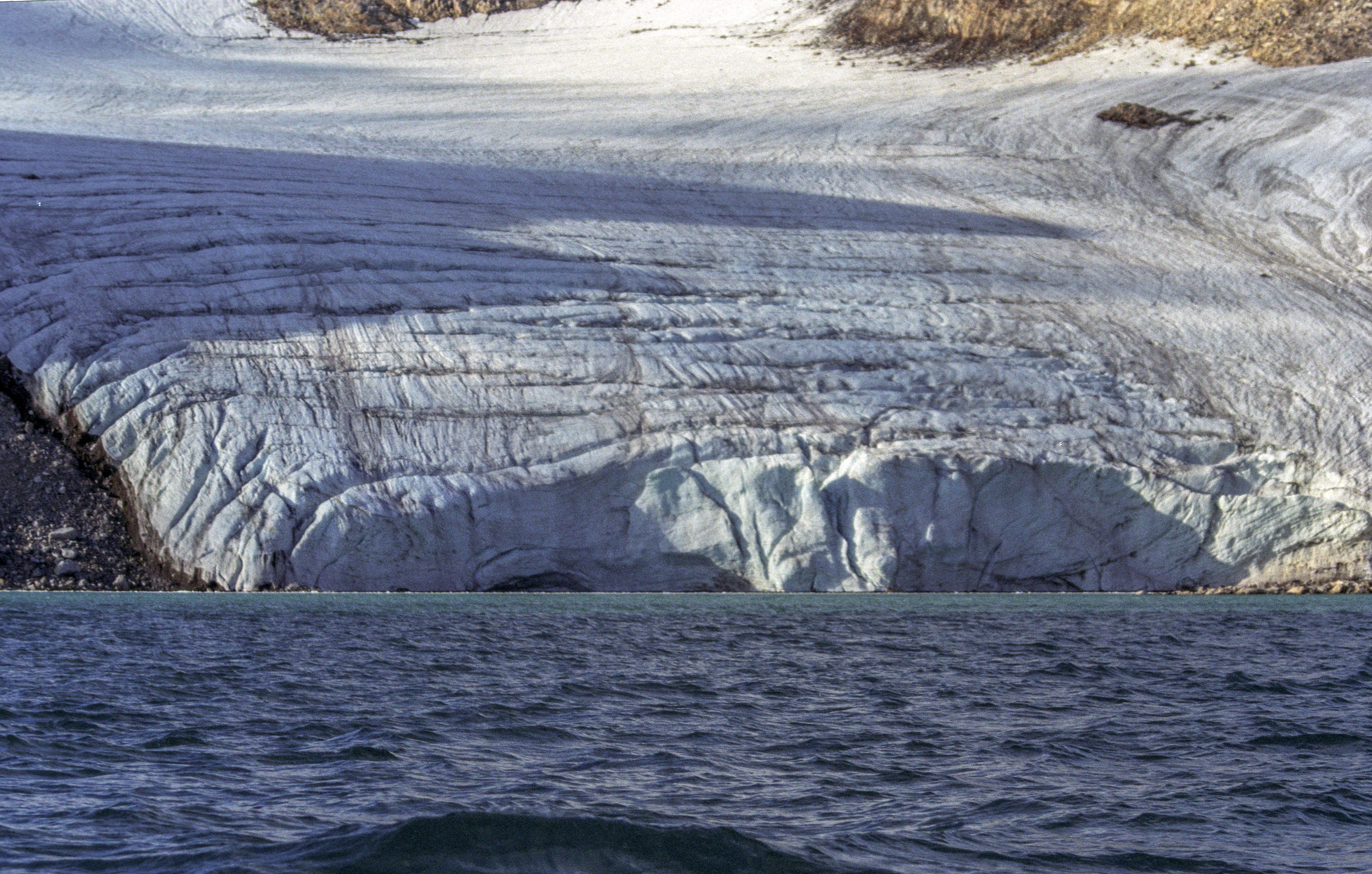 Svalbard, Hammiltonbreen